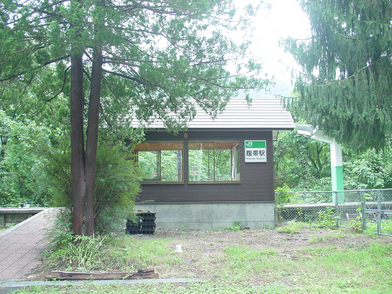 （腹帯駅）